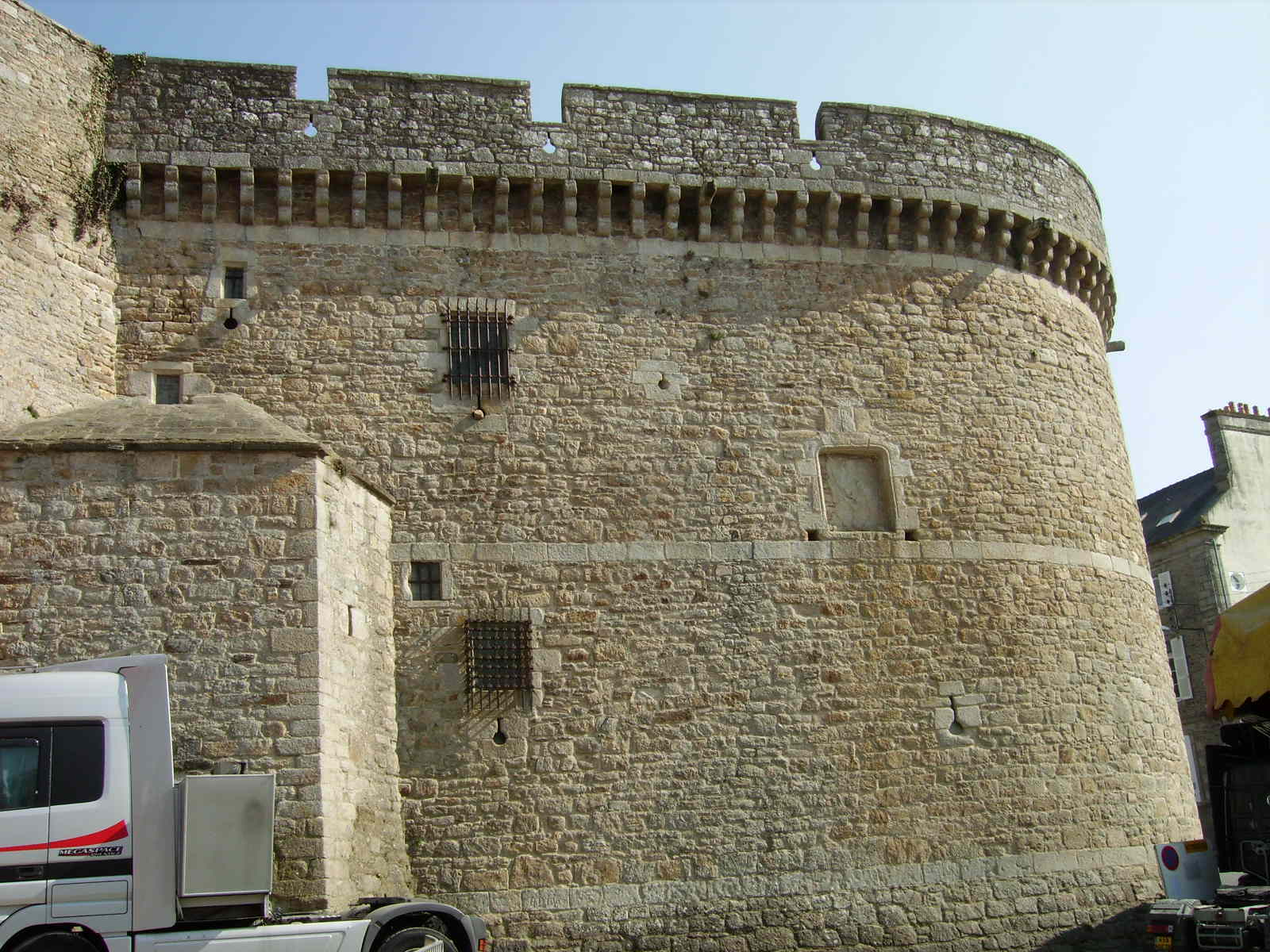 Turo de Coëtquen en Dinan (Bretonujo)